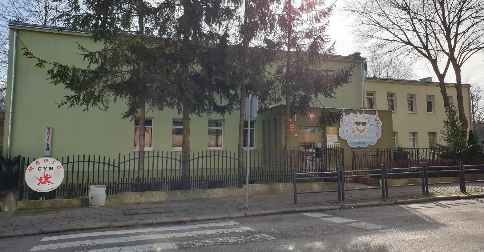 Stargard. Byłe Przedszkole Luxpolu